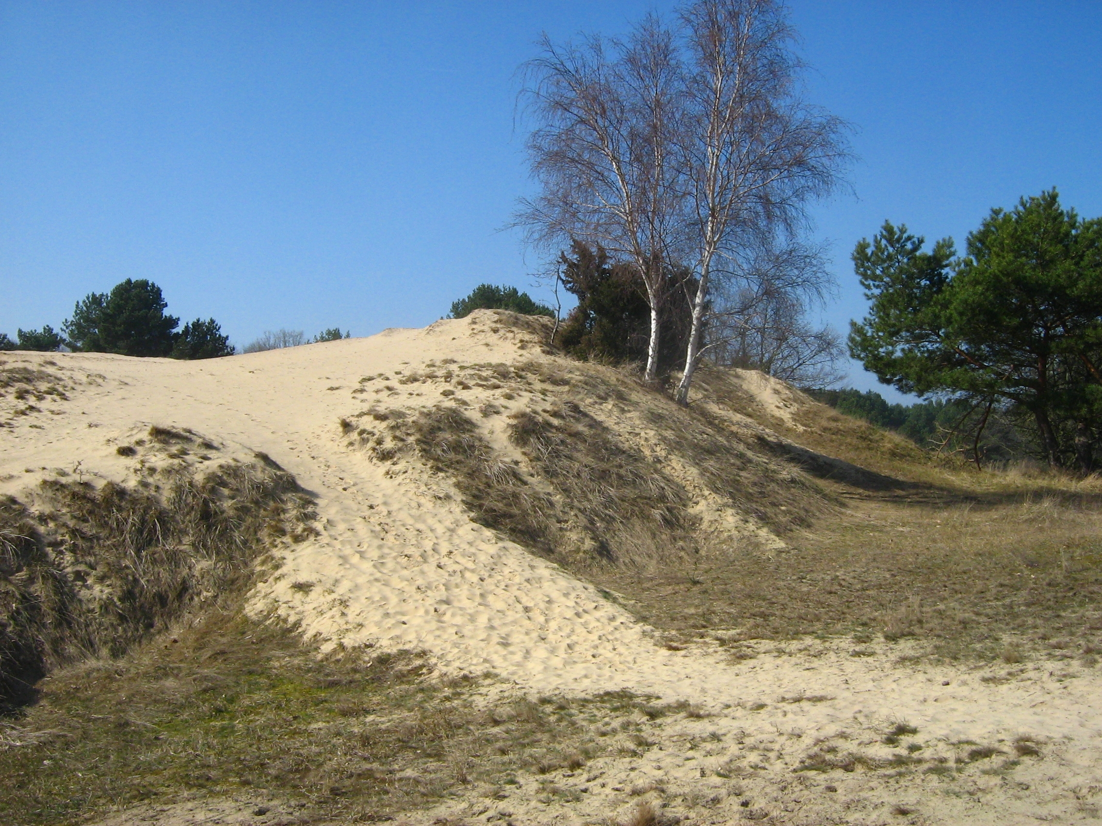 Altwarper Binnendünen